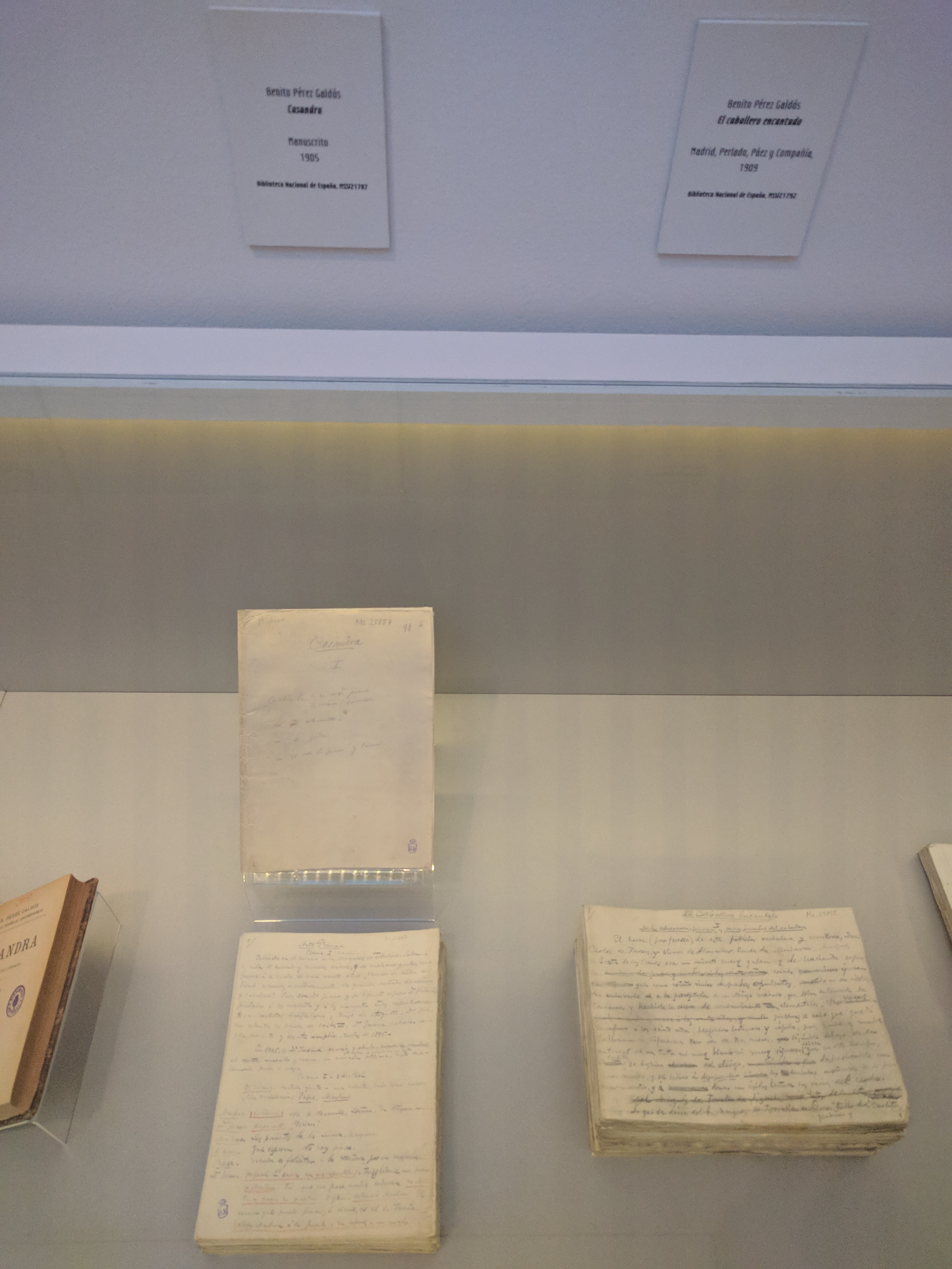 Manuscritos de Casandra (novela) y El caballero encantado, de Benito Pérez Galdós. 1905 y 1909. Biblioteca Nacional de España.